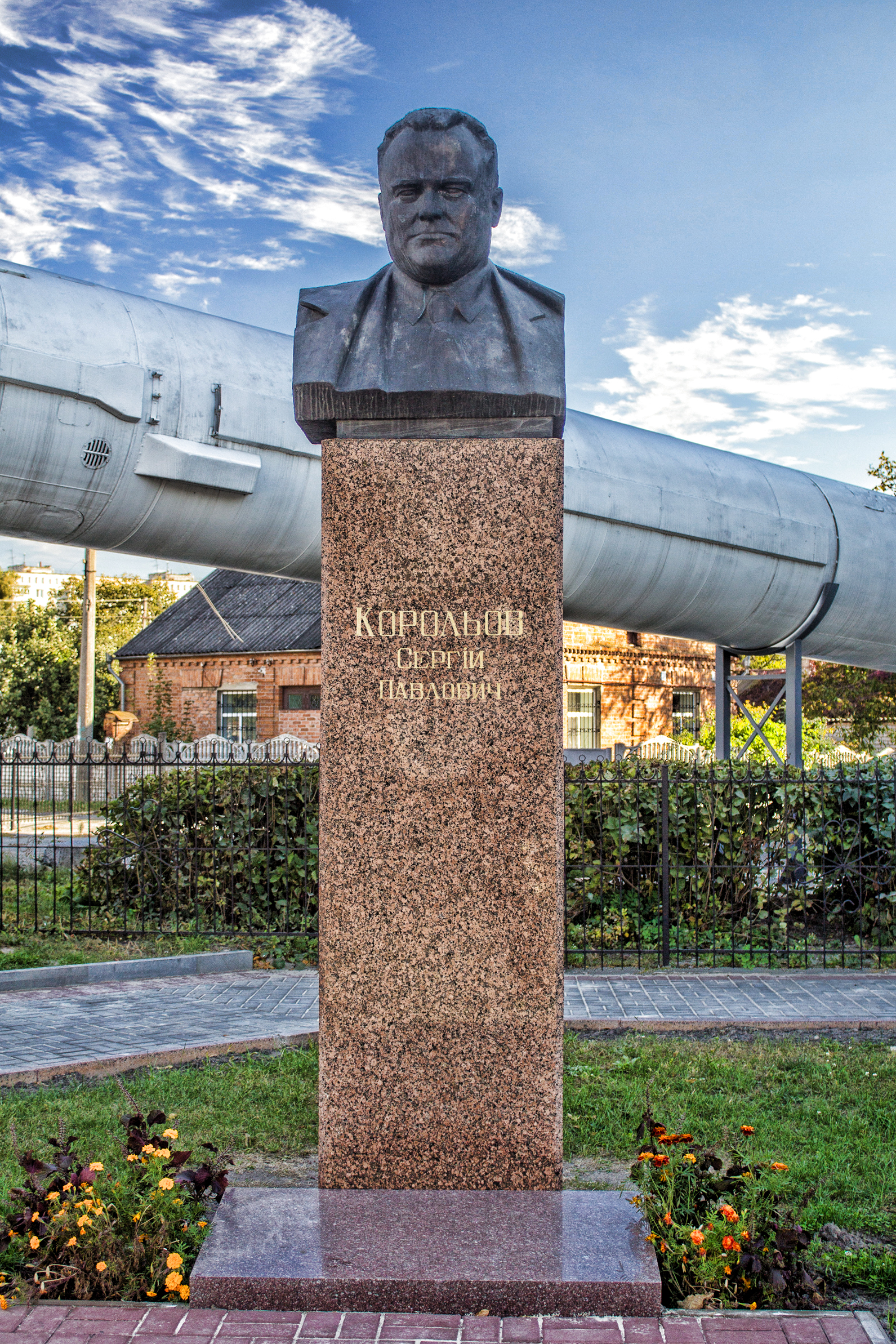 Пам'ятник С. П. Корольову — конструктору космічних ракет., Житомир, Вул. І. Франка, 2